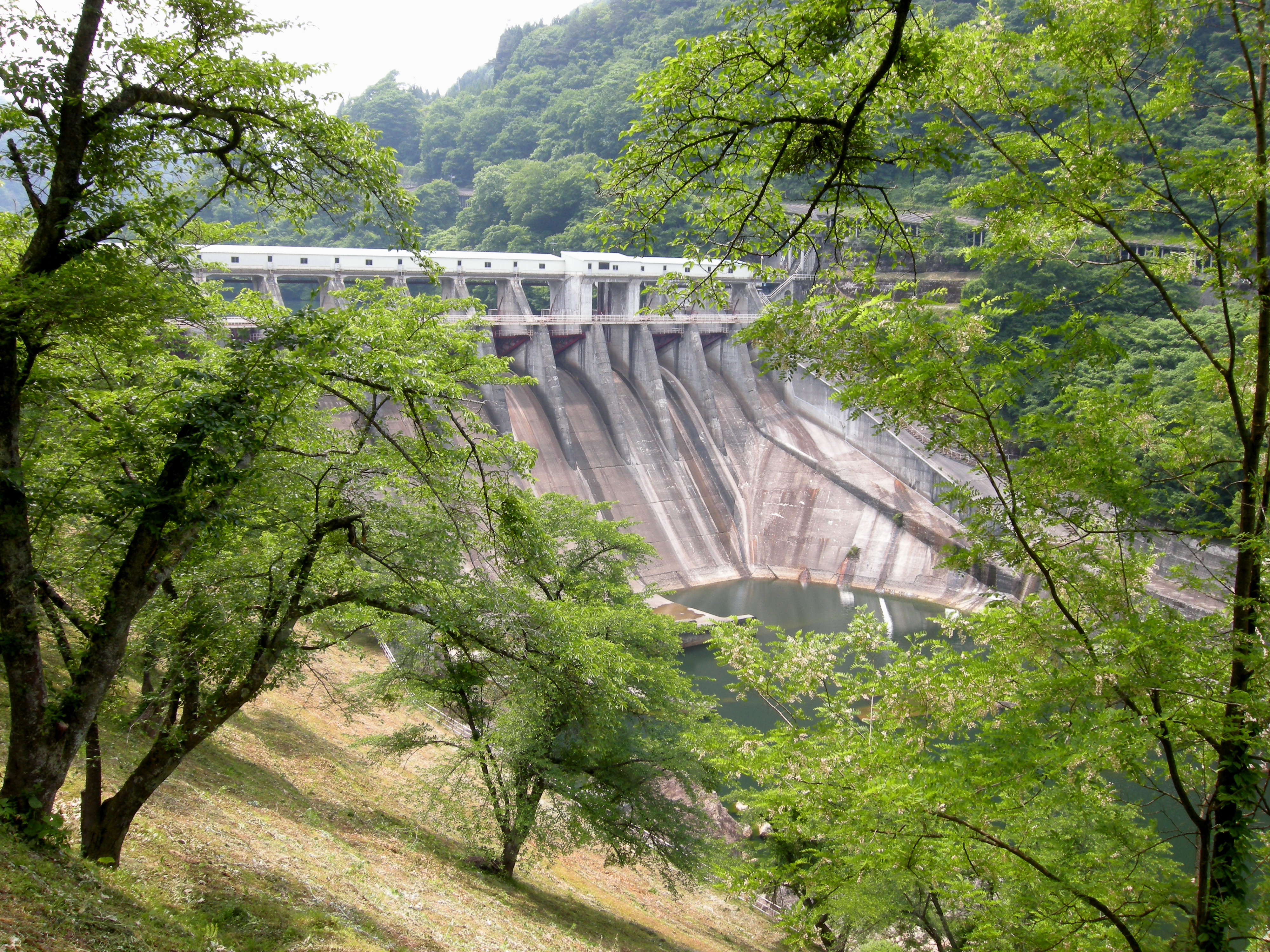 Miyashita Dam